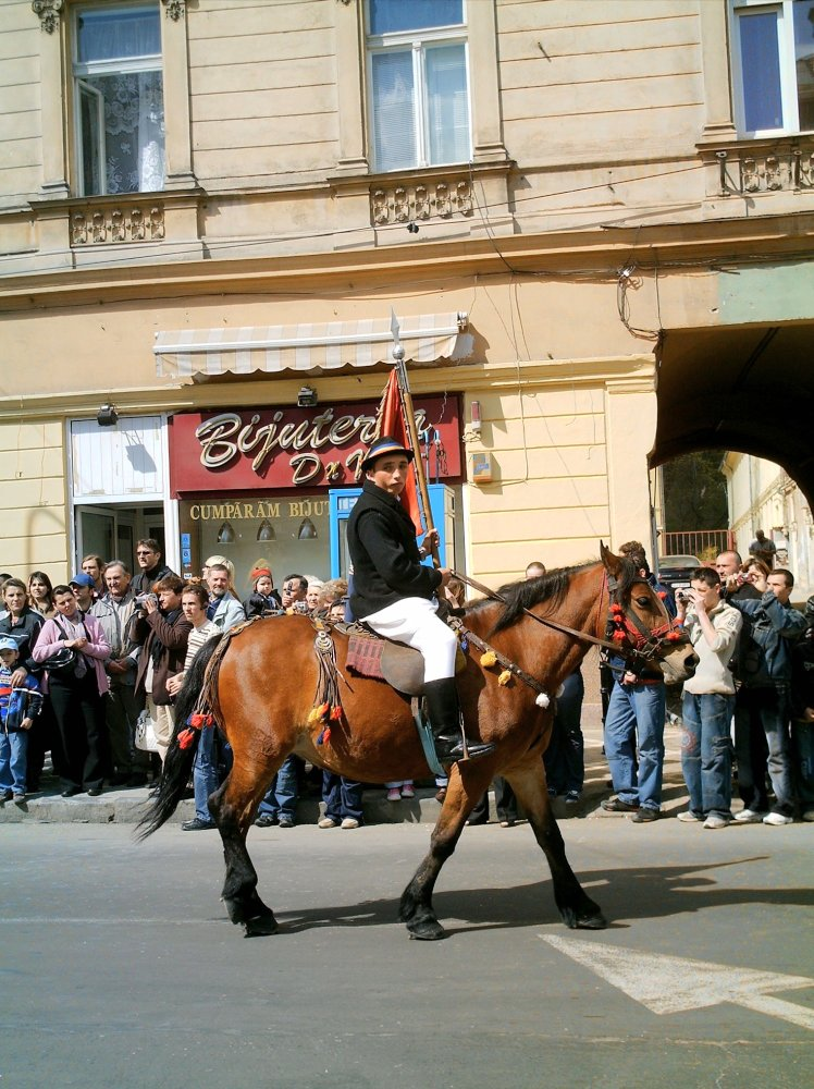 Junii Tineri - stegarul